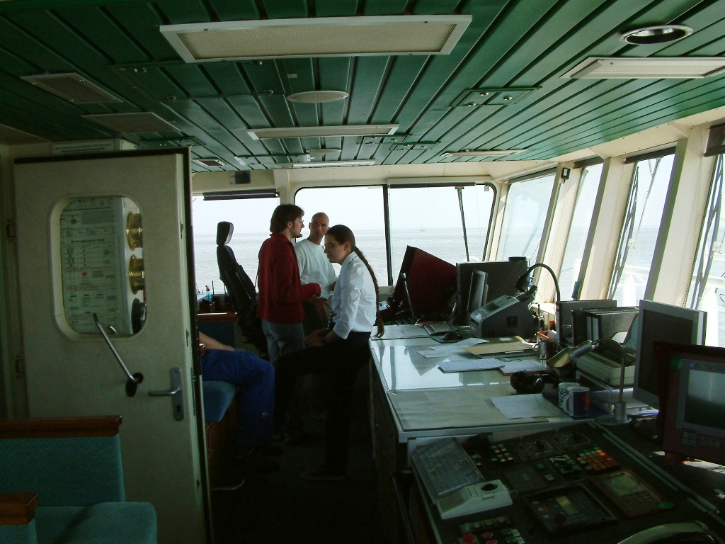 Brücke vom SWATH-Tender Döse